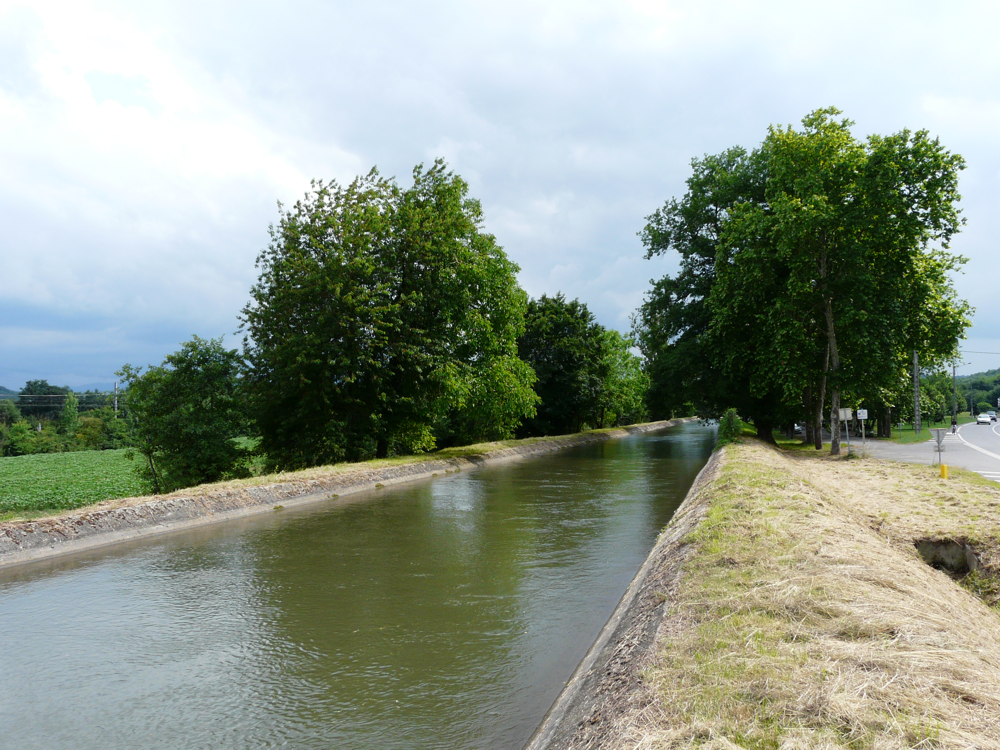 Le canal de Saint-Martory sur la commune de Boussens, au nord du rond-point des routes départementales 635 et 817, Haute-Garonne, France. Vue prise en direction de l'amont.